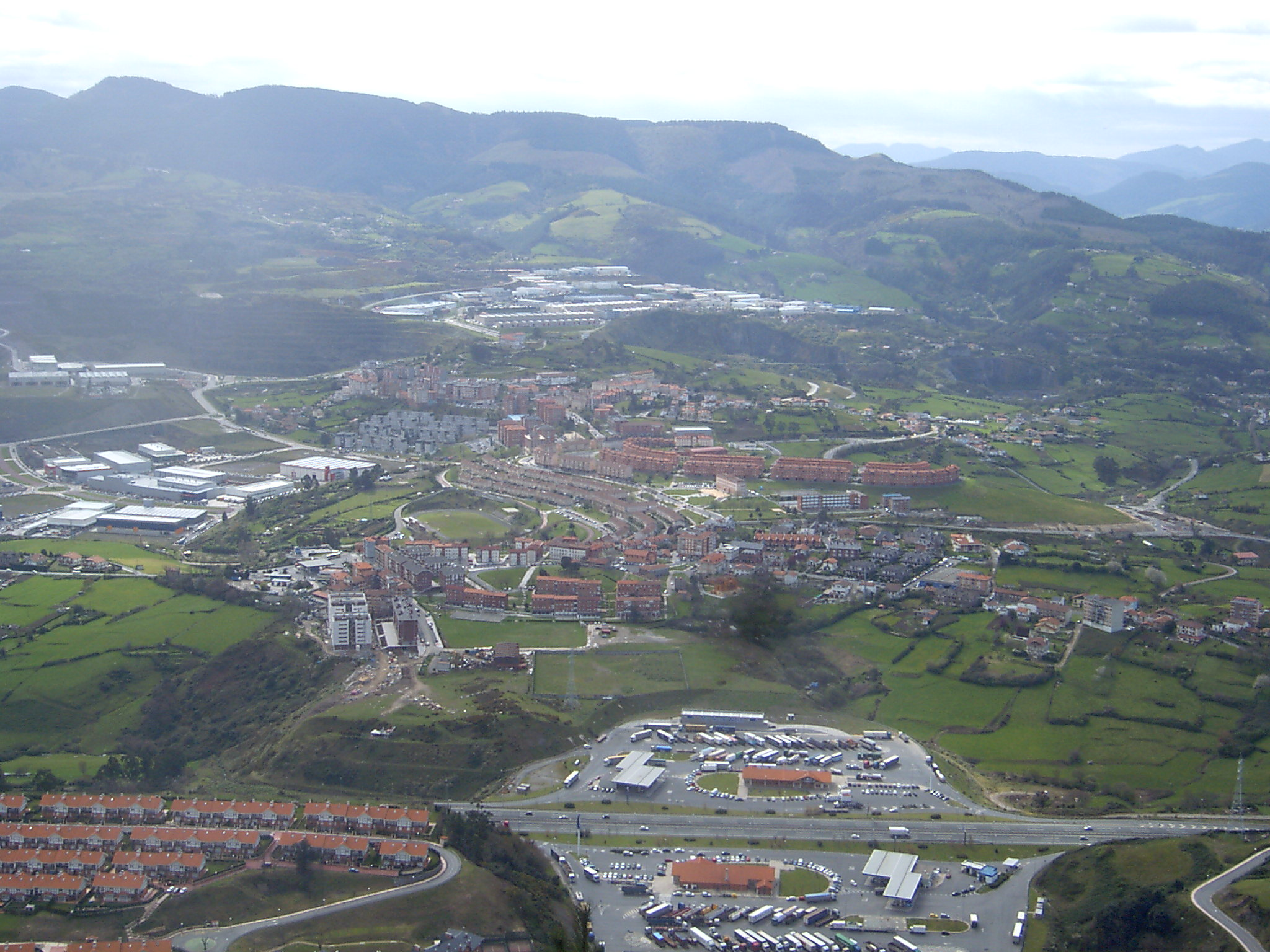 Gallarta auzoa